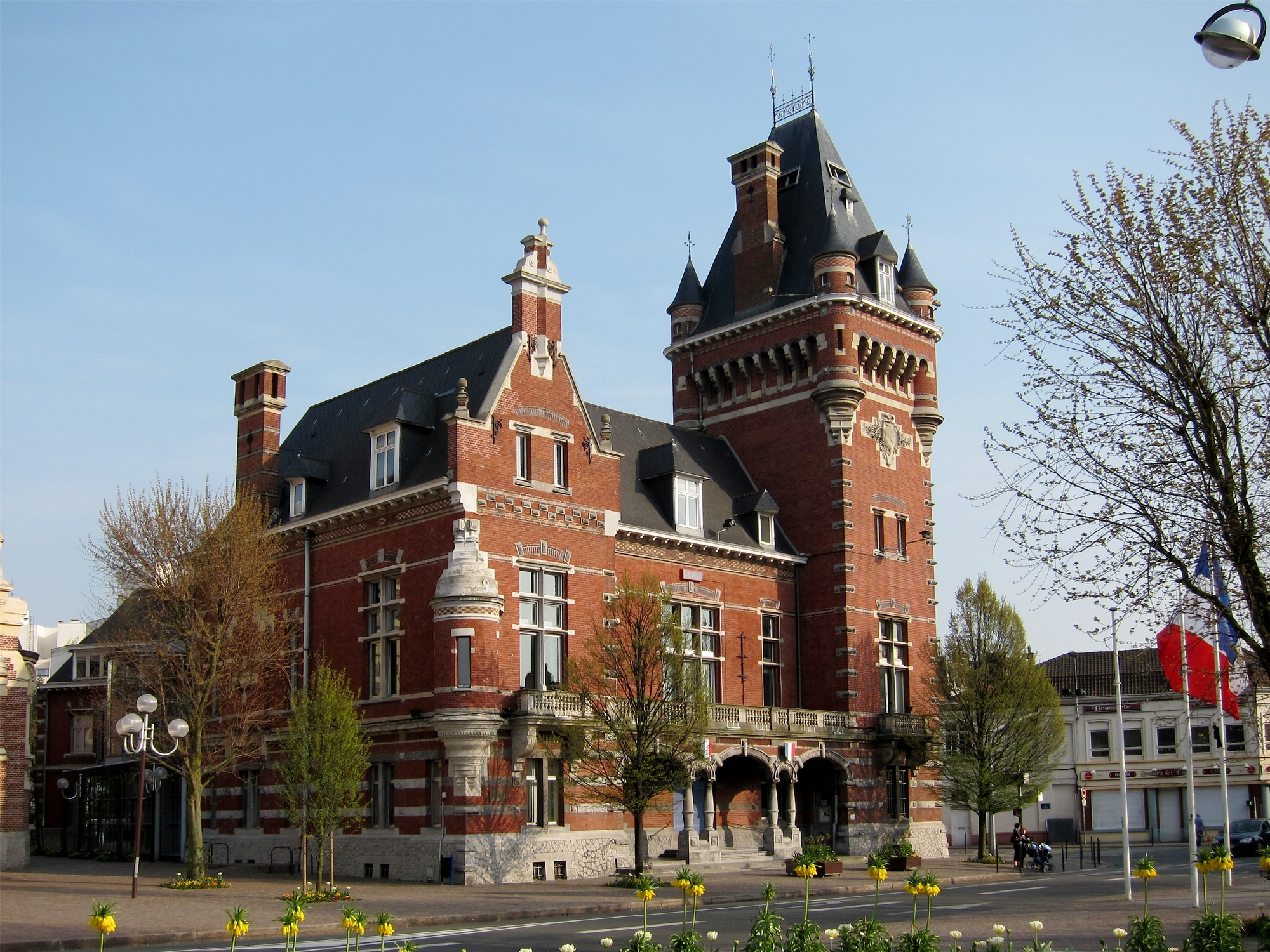 L'hôtel de ville de La Madeleine (Nord).